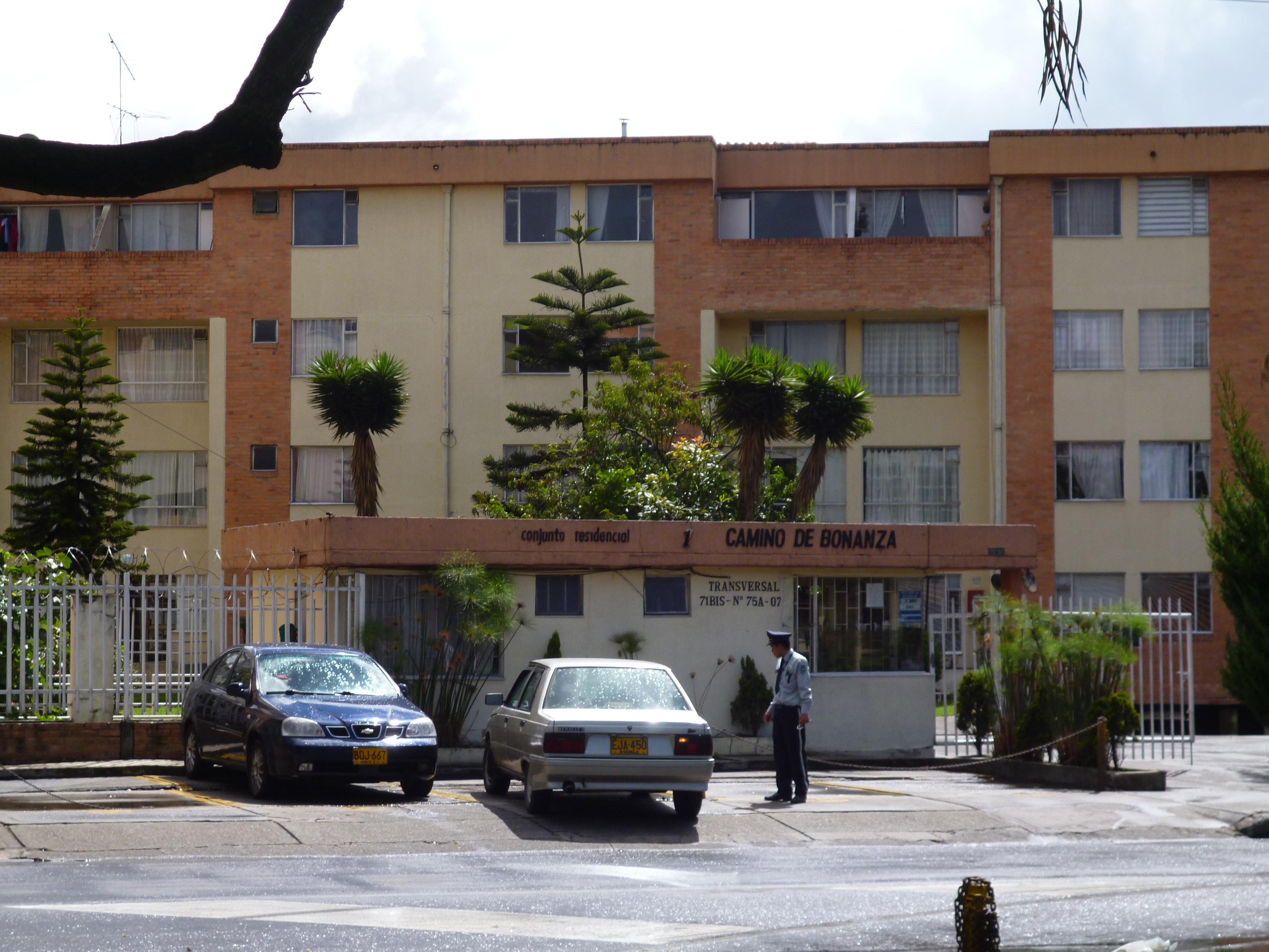 barrio de bogotá